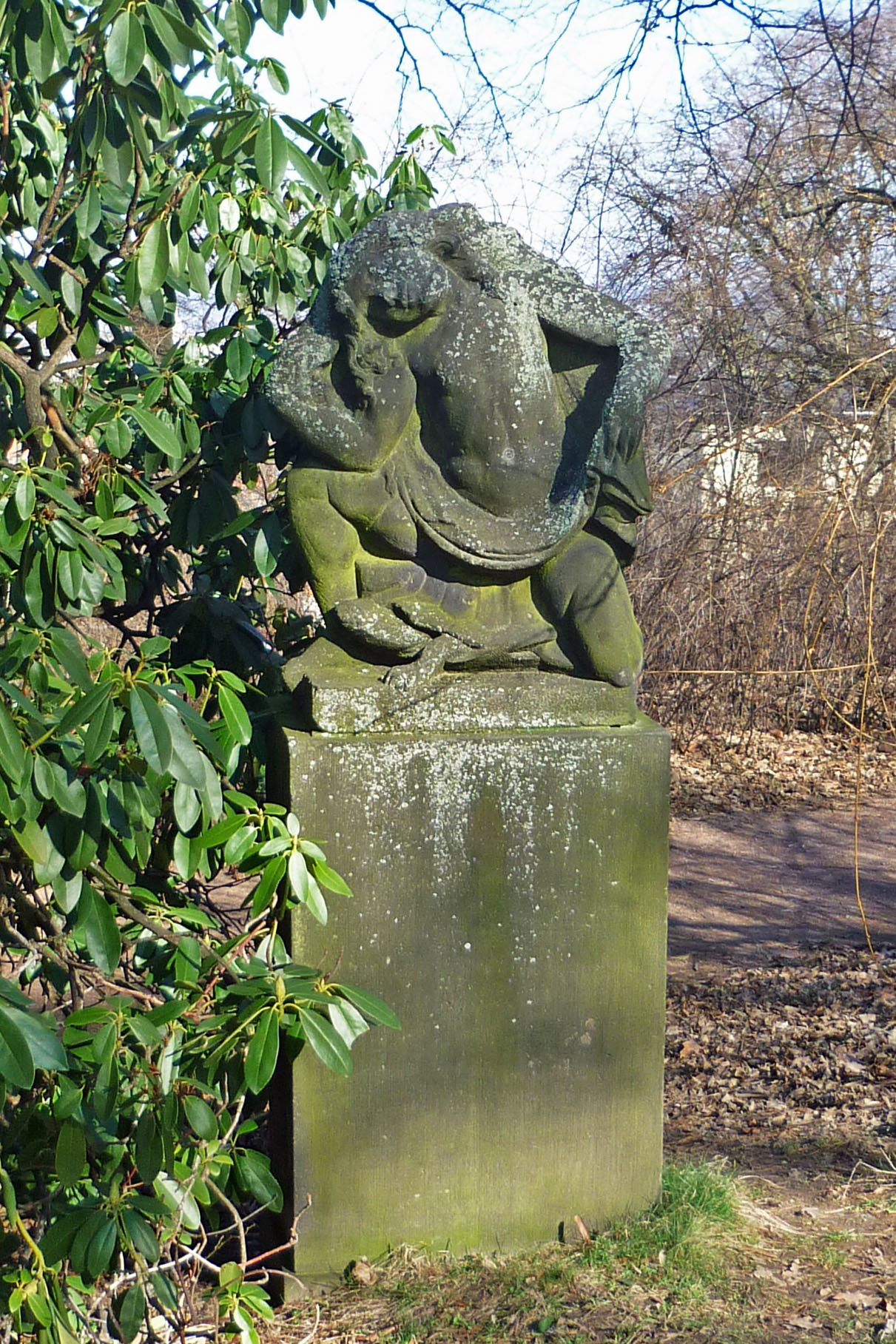 Kind mit Schildkröte im Fichtepark Dresden-Plauen (Skulptur von Paul Polte)